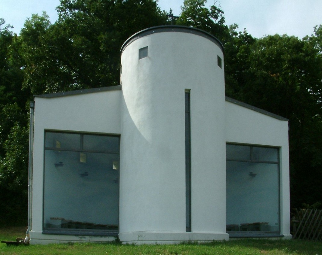 Hildegard-Kapelle am Waldrand auf dem Disibodenberg, Odernheim am Glan